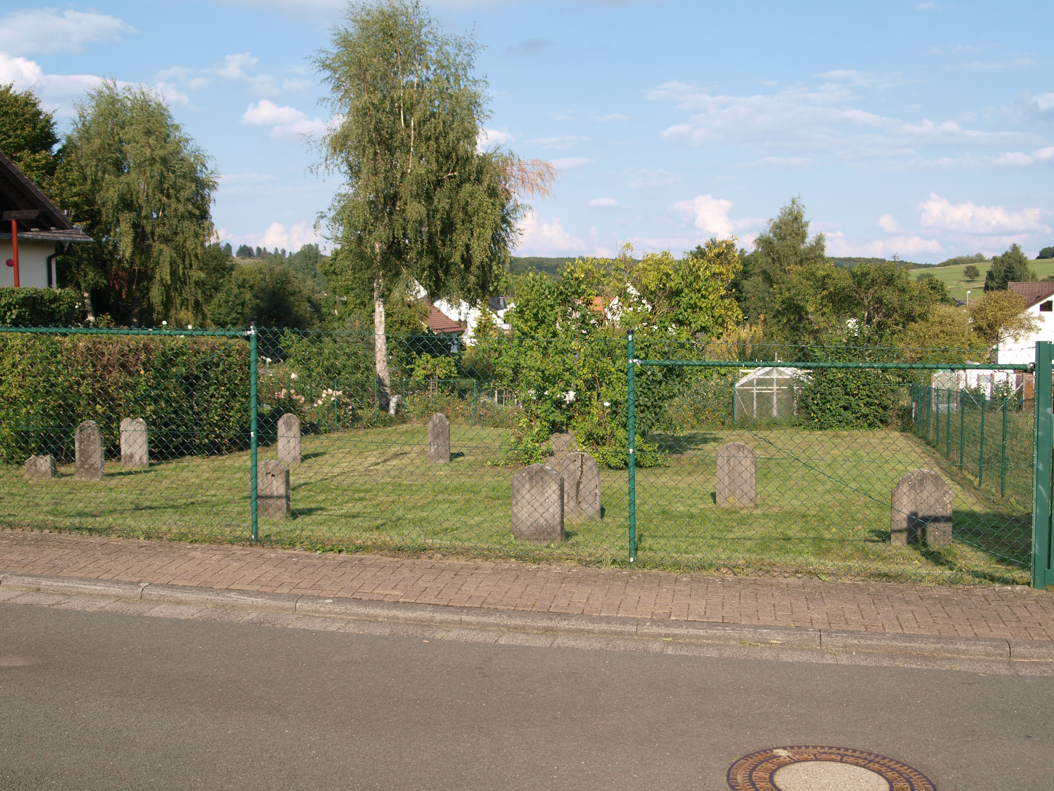 Judenfriedhof in der Straße „Weihergärten“, Mengerskirchen